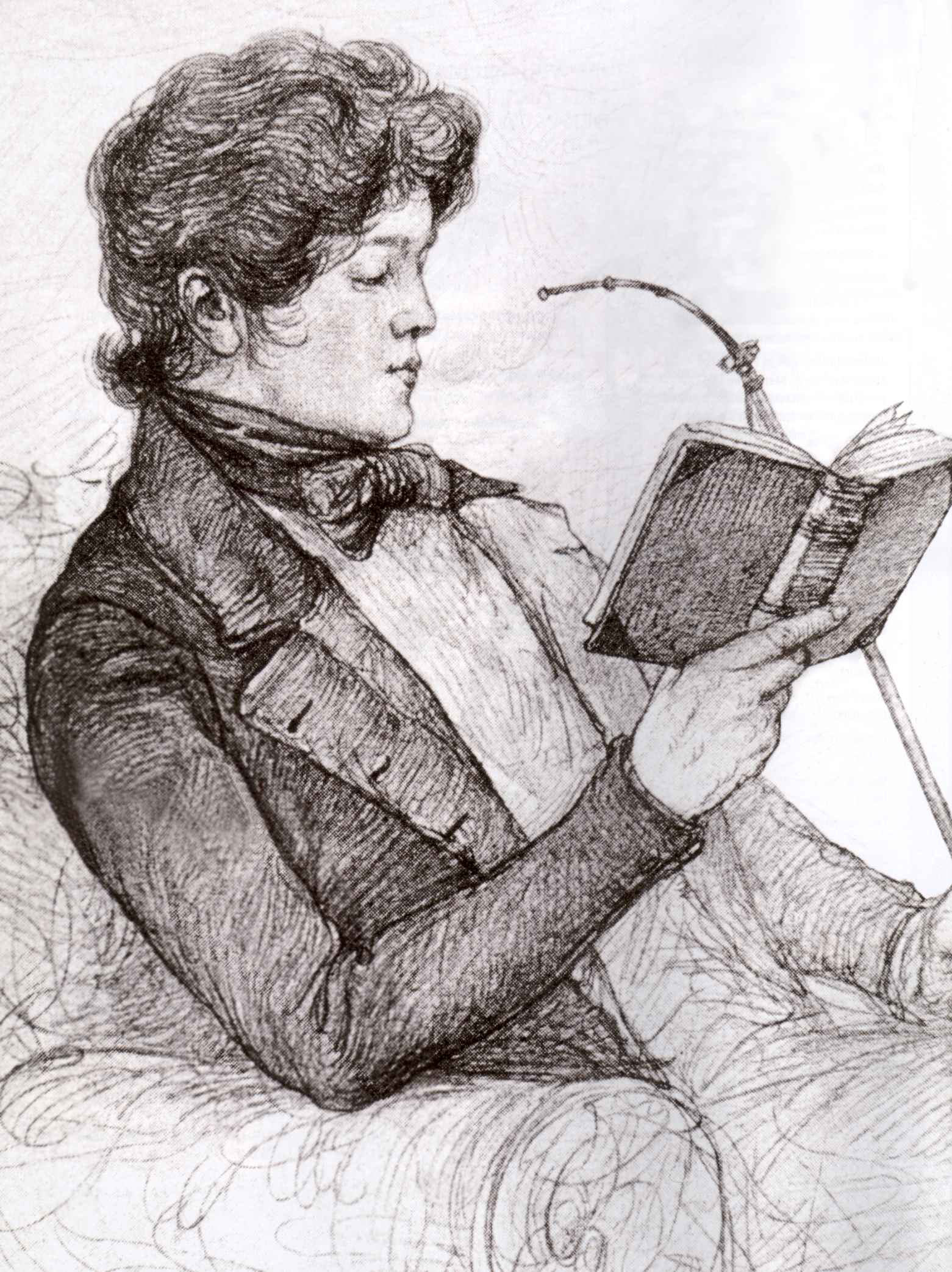 Portrait von Otto von Bismarck (1815-1898) als Student in Göttingen im Alter von etwa 18 Jahren, erstellt von dem Maler Christian Wilhelm Allers (1857-1915).